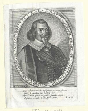 Ludwig von Hörnigk (1600-1667), Arzt und Jurist, kaiserlicher Rat, Kurmaizer Rat, Vater von Philipp Wilhelm von Hörnigk